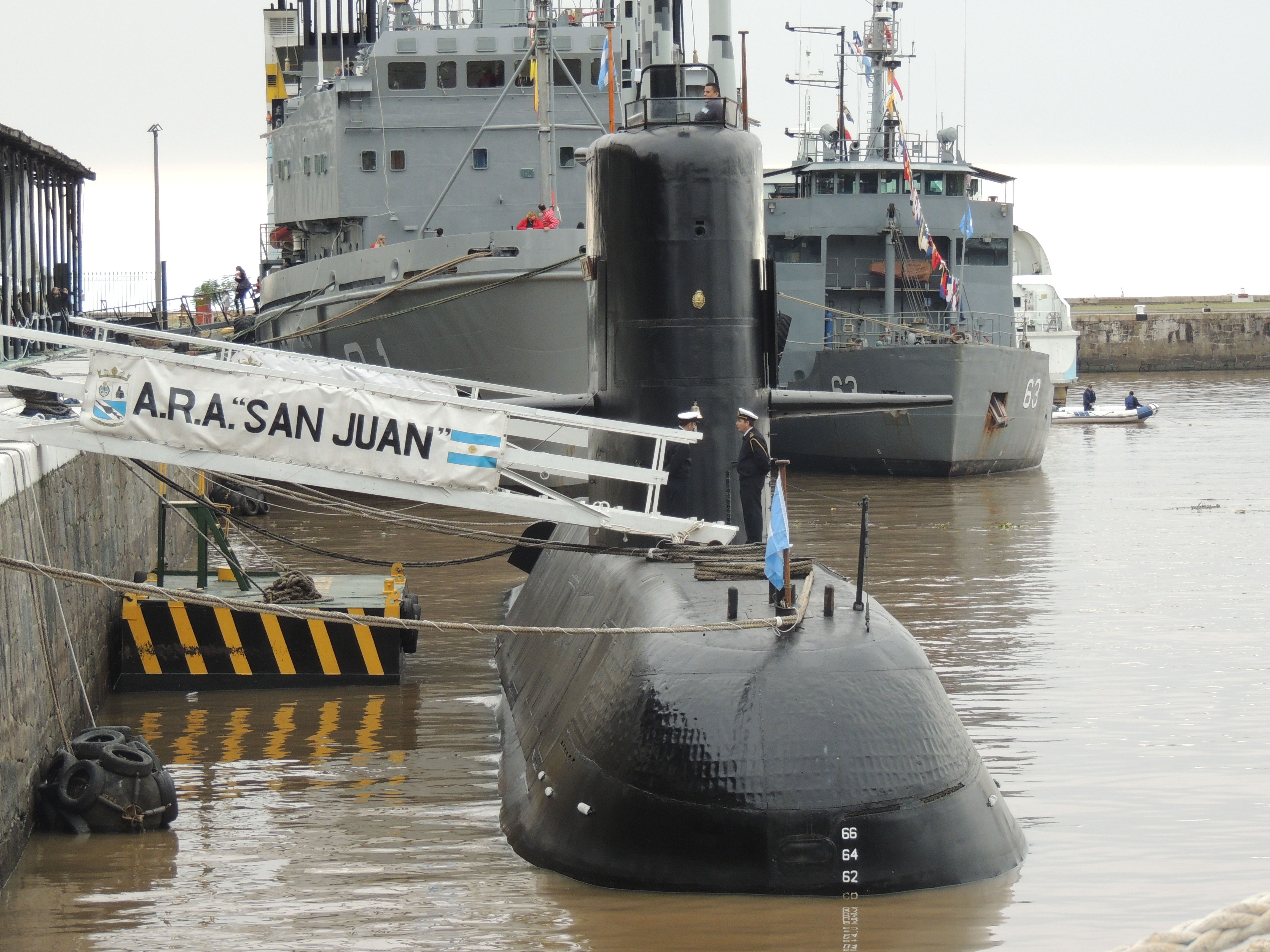 Submarino ARA San Juan en el Apostadero Naval de Buenos Aires, durante una jornada de puertas abiertas en mayo de 2017 por el día de la Armada Argentina. De fondo de se ve el aviso ARA Puerto Argentino.